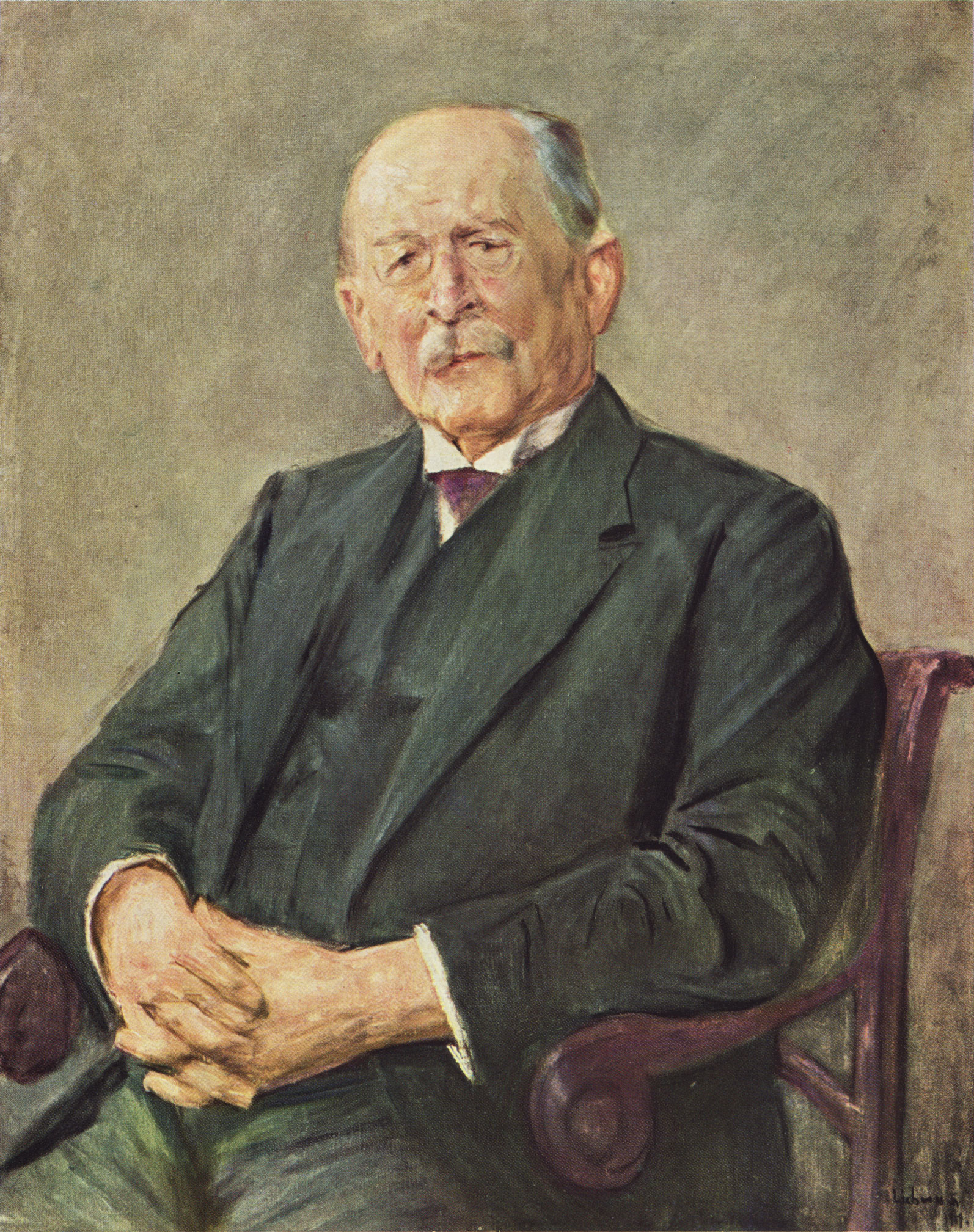 Portrait von Otto Gerstenberg von Max Liebermann